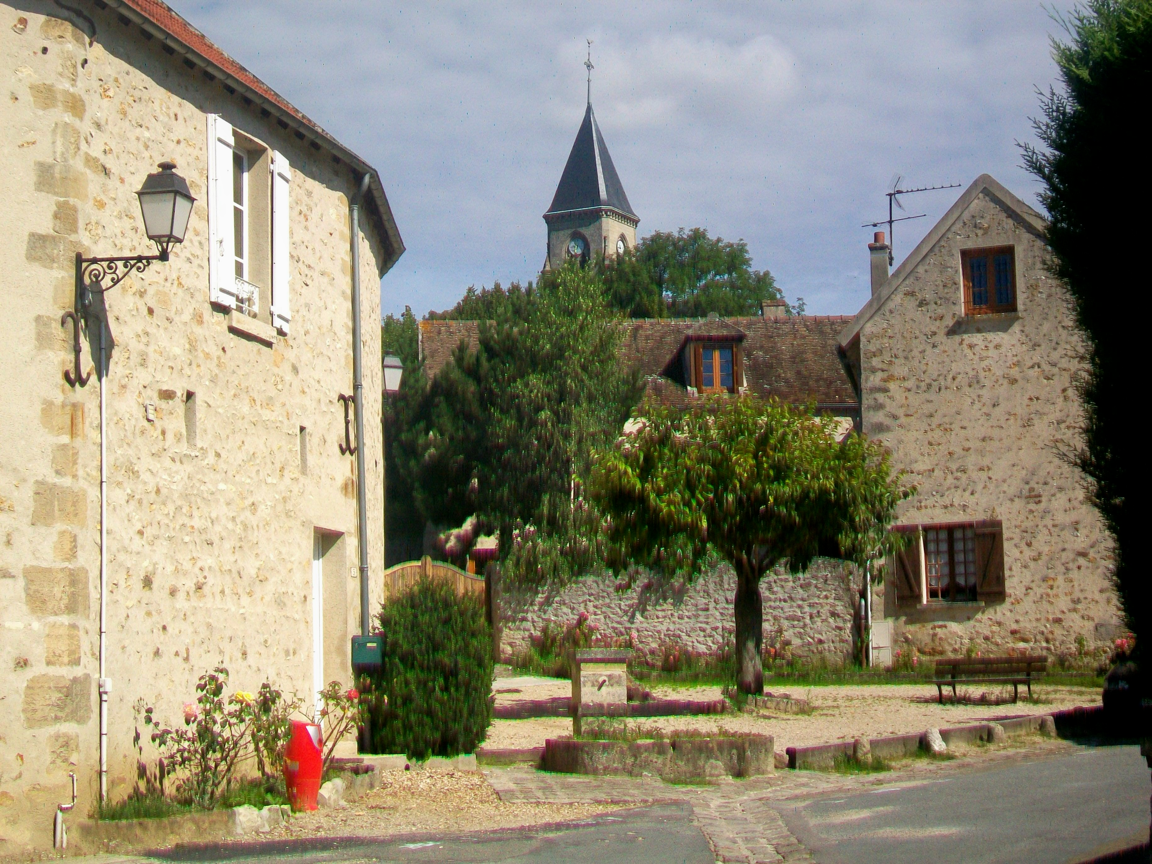 La fontaine de la place Albert-Hamot ; vue sur l'église.